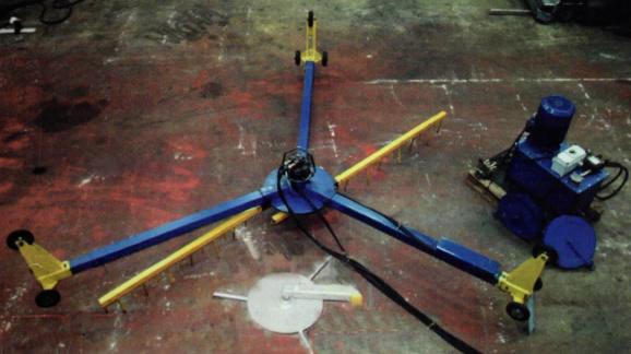 Bilde av Berge Grasfordelar som vert nytta til å fordele gras i siloar.